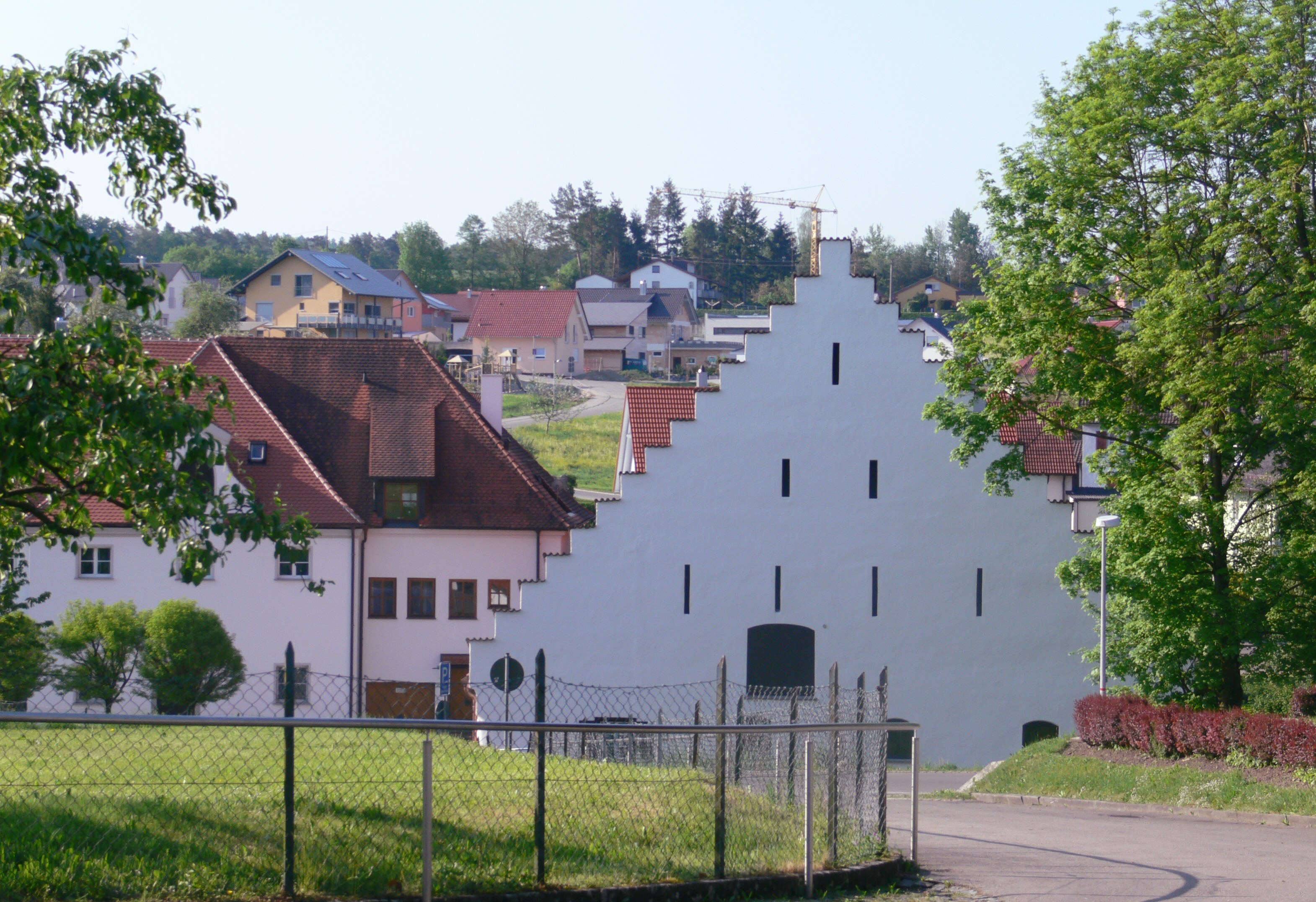 Ehemaliges Zisterzienserinnenkloster Baindt, Landkreis Ravensburg Blick vom Klosterhof in Richtung des heutigen Gemeindezentrum Baindts